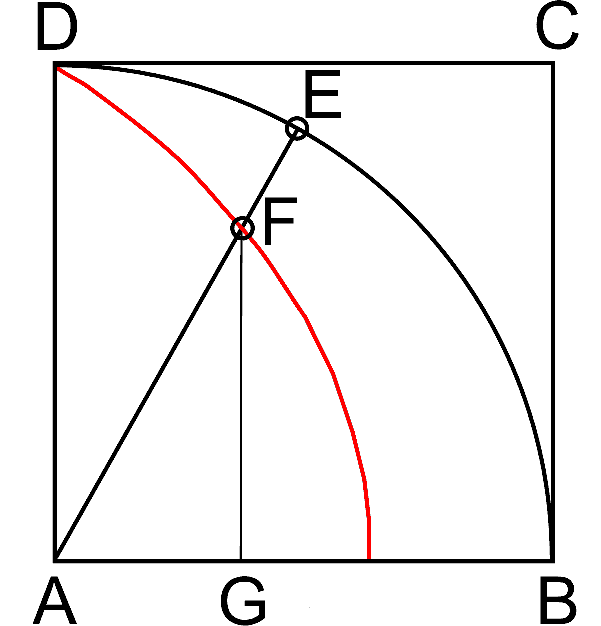 Quadratrix